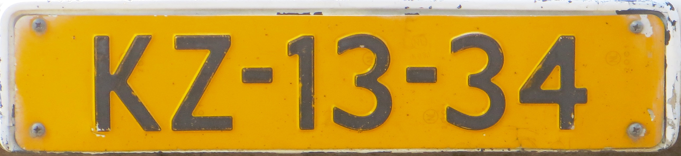 KMAR kentekenplaat